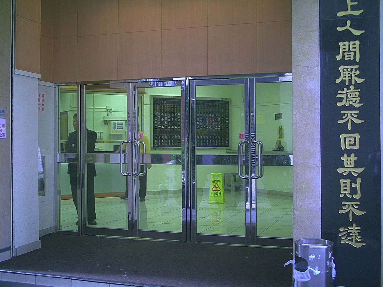 世盛殯儀館，是香港一間殯儀館，前身為永恆殯儀館，位於九龍紅磡，為香港主要的殯儀館之一，亦是香港唯一可以由食物環境衛生署招標經營的殯儀館。 Photo created by User:RockLi.